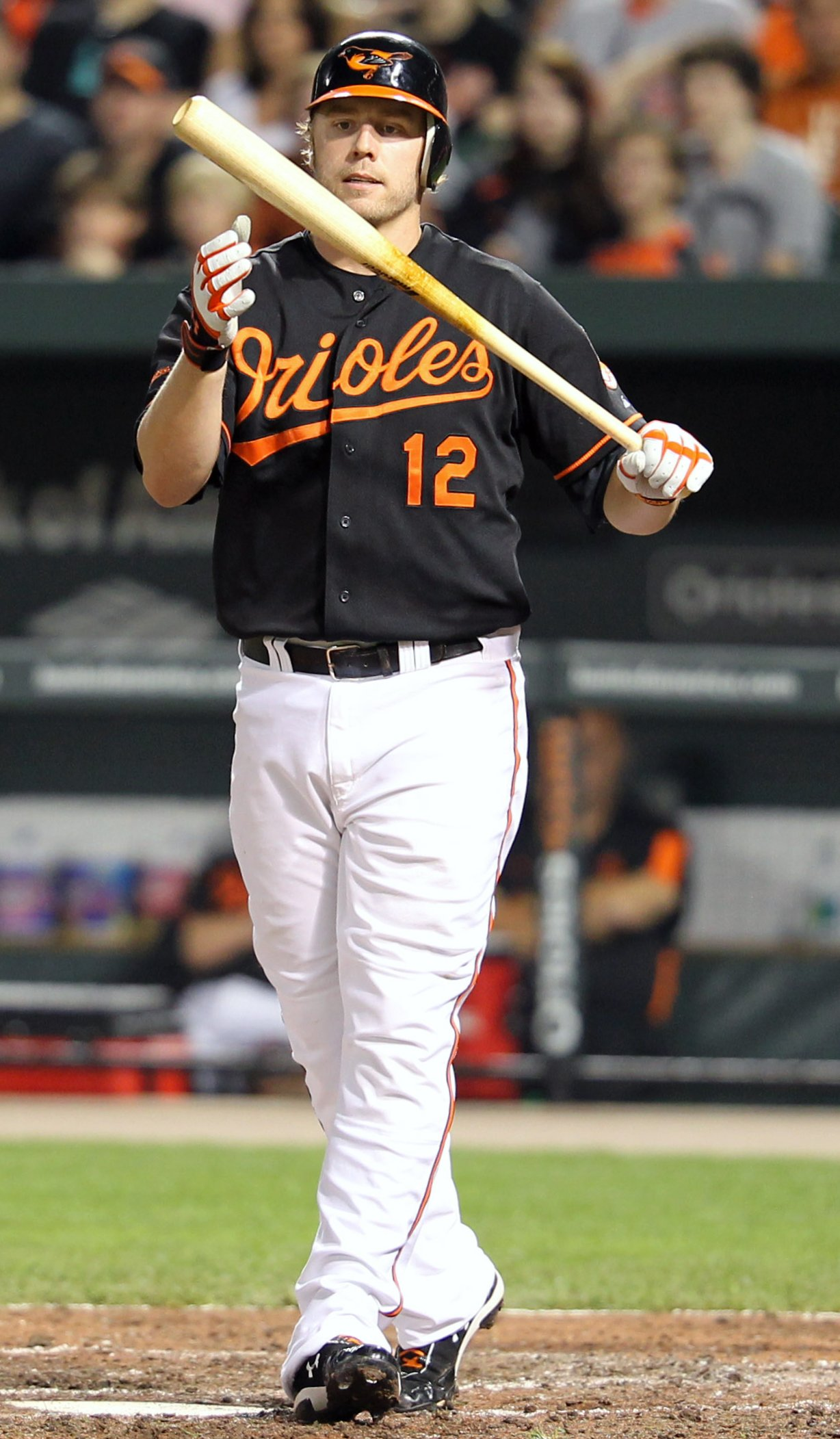 Mark Reynolds